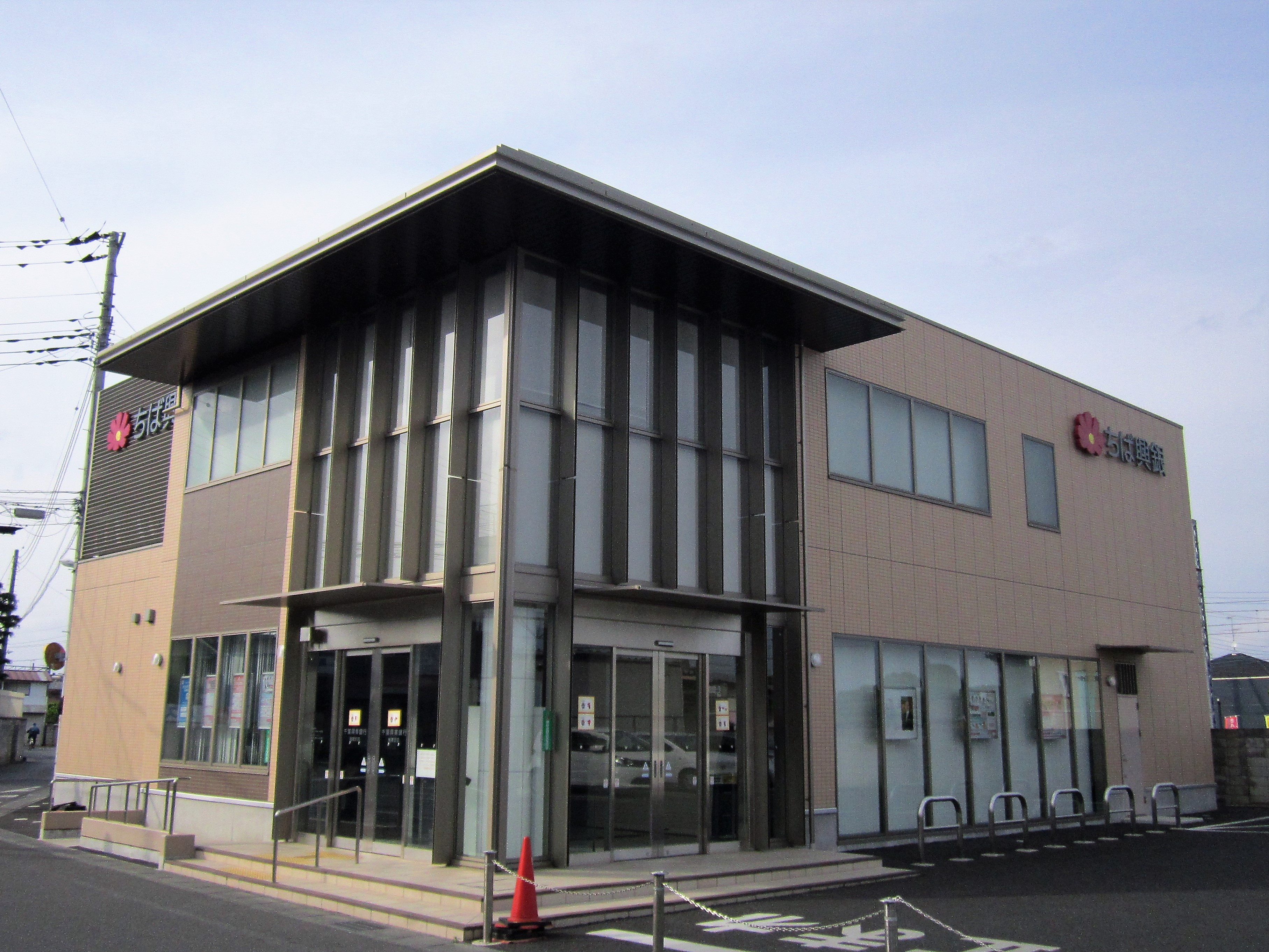 千葉興業銀行梅郷支店（野田市山崎） Canon PowerShot A2200